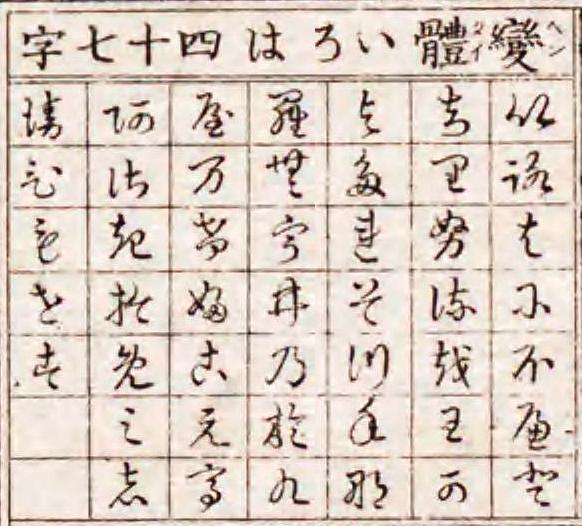 明治19年刊『現今児童重宝記 : 開化実益』より。